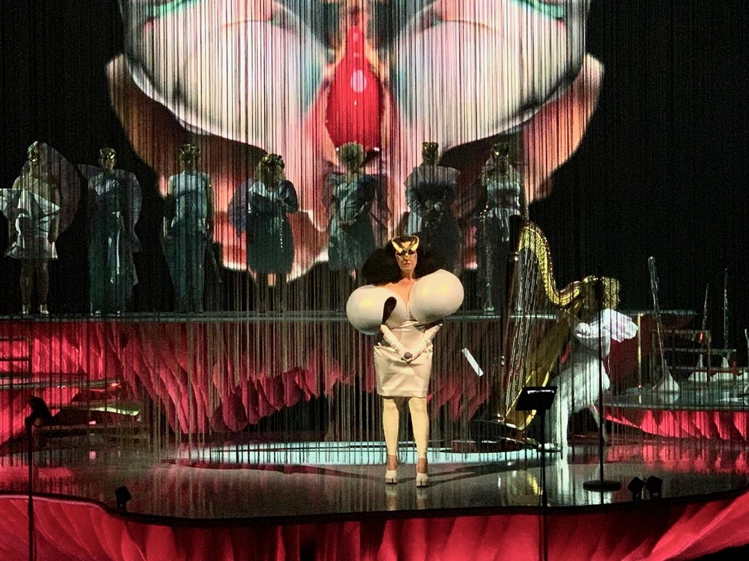 Residency show Cornucopia - Björk allo Shed di New York, 9 maggio 2019